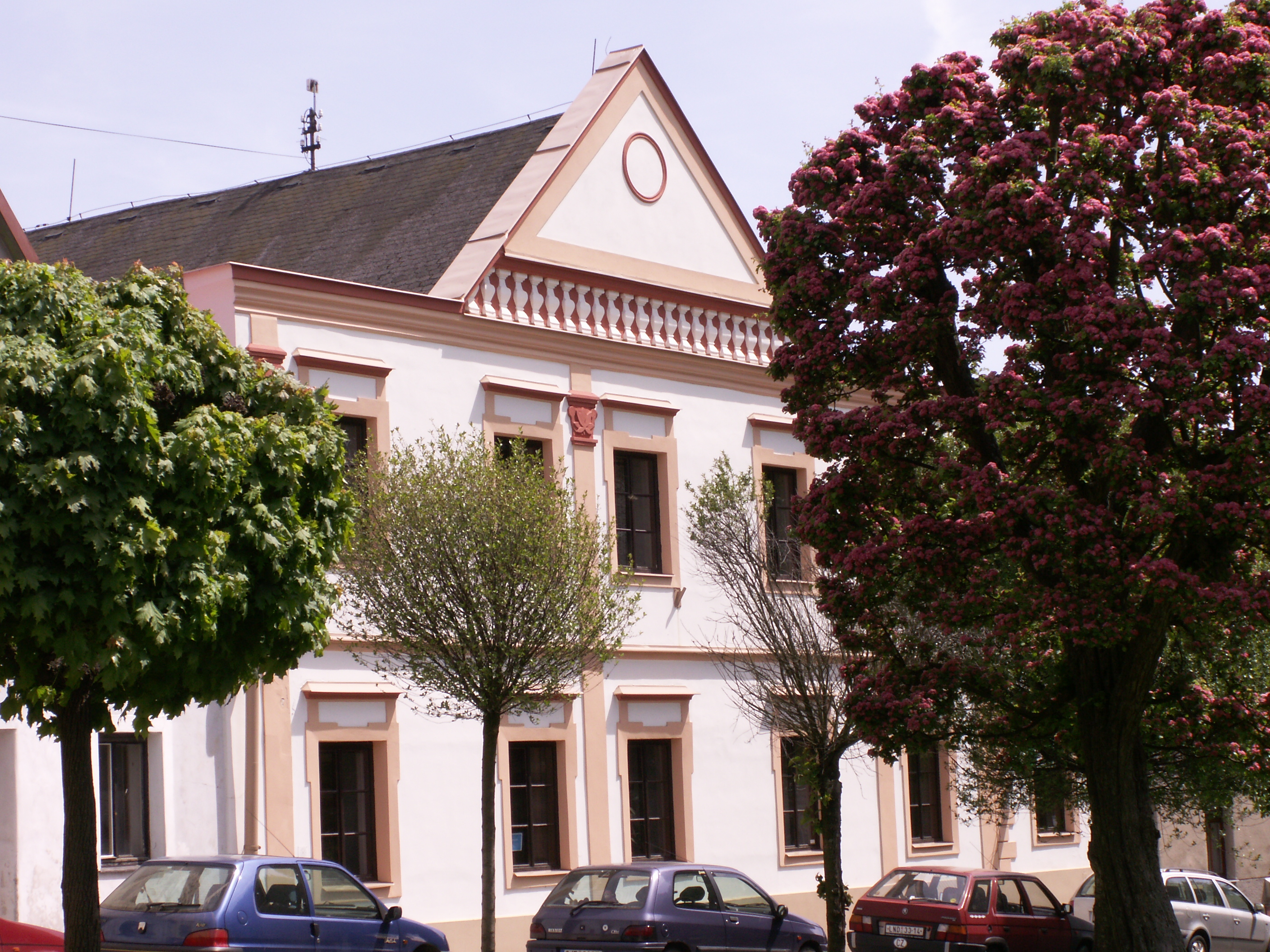 Měšťanský dům (Přibyslav), Bechyňovo nám. 45.Kurfürstův dům. Původní budova středověké zástavby města. Dům pochází z roku 1654. Majitelé a pronajimatelé : Tomáš Bělský řezník 1675. Jakub Varhánek zemědělec 1713. Václav Ráček bohatý měšťan 1776. František Smejkal železník (majitel železářství) 1850. František Alois Smejkal kroupař 1864 zřejmě pronájem od rodinného příslušníka. Jindřich Smejkal měšťan a obchodník majitelem dům do roku 1901. Potom příbuzenská větev Smejkalů končí. Jan Kurfürst učitel majitel 1901. V domě v roce 1919 prodejna Barbory Macháčkové - Nákup a prodej tuků. Provozovna na výrobu textilií Jan Kell 1928. Marie Smejkalová výroba umělých květin. Povozník Václav Zábrana 1946. Dům zrekonstruhován 1996 a změněn na Městskou knihovnu a infocentrum spolu s přiléhajícím objektem změněn na muzeum. Kurfürstův dům. Informační centrum a Městské muzeum Přibyslav Bechyňovo náměstí 45 582 22 Přibyslav. Okr. Havlíčkův Brod. Kraj Vysočina. Czech Republik.